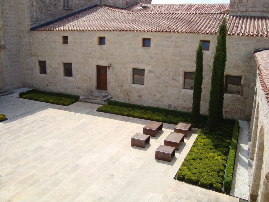 Patio de la Cartuja.